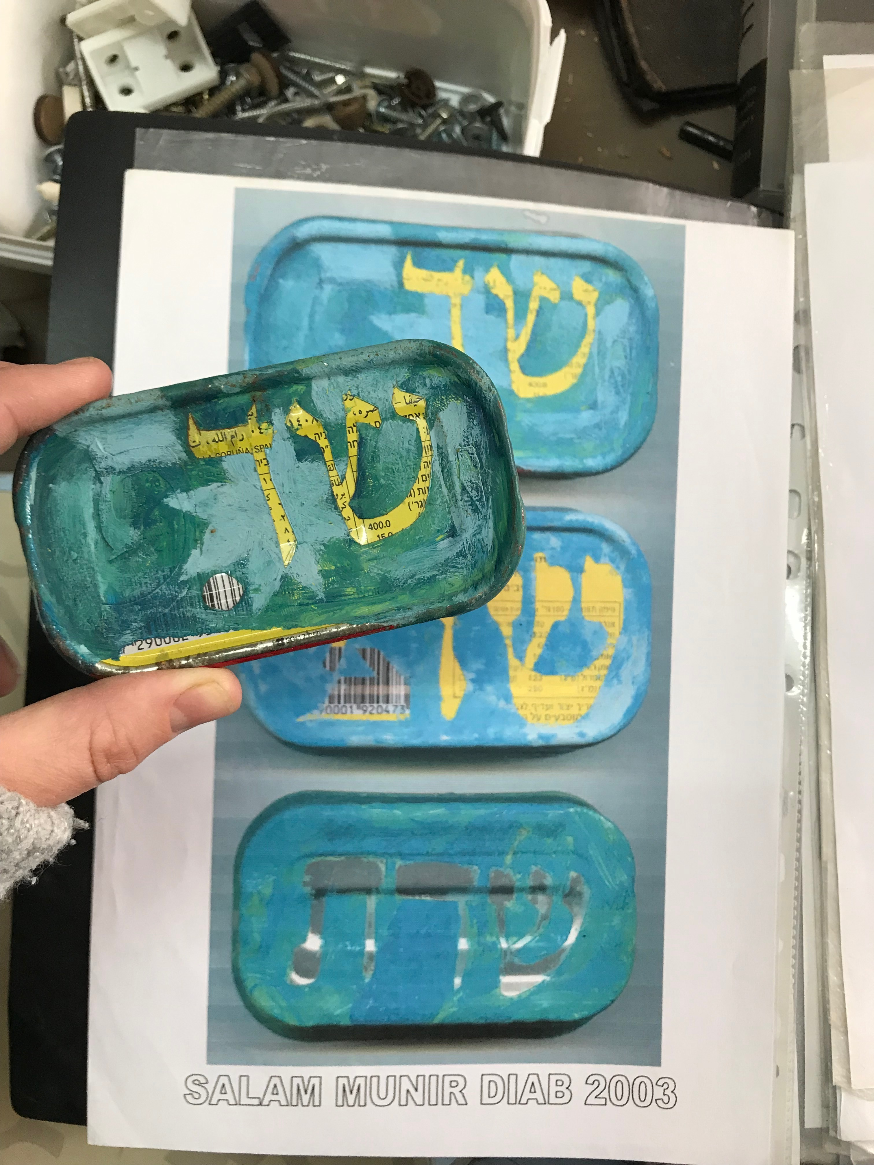 2003-2012 , טכניקה מעורבת